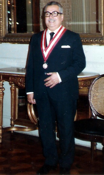 Foto de archivo familiar